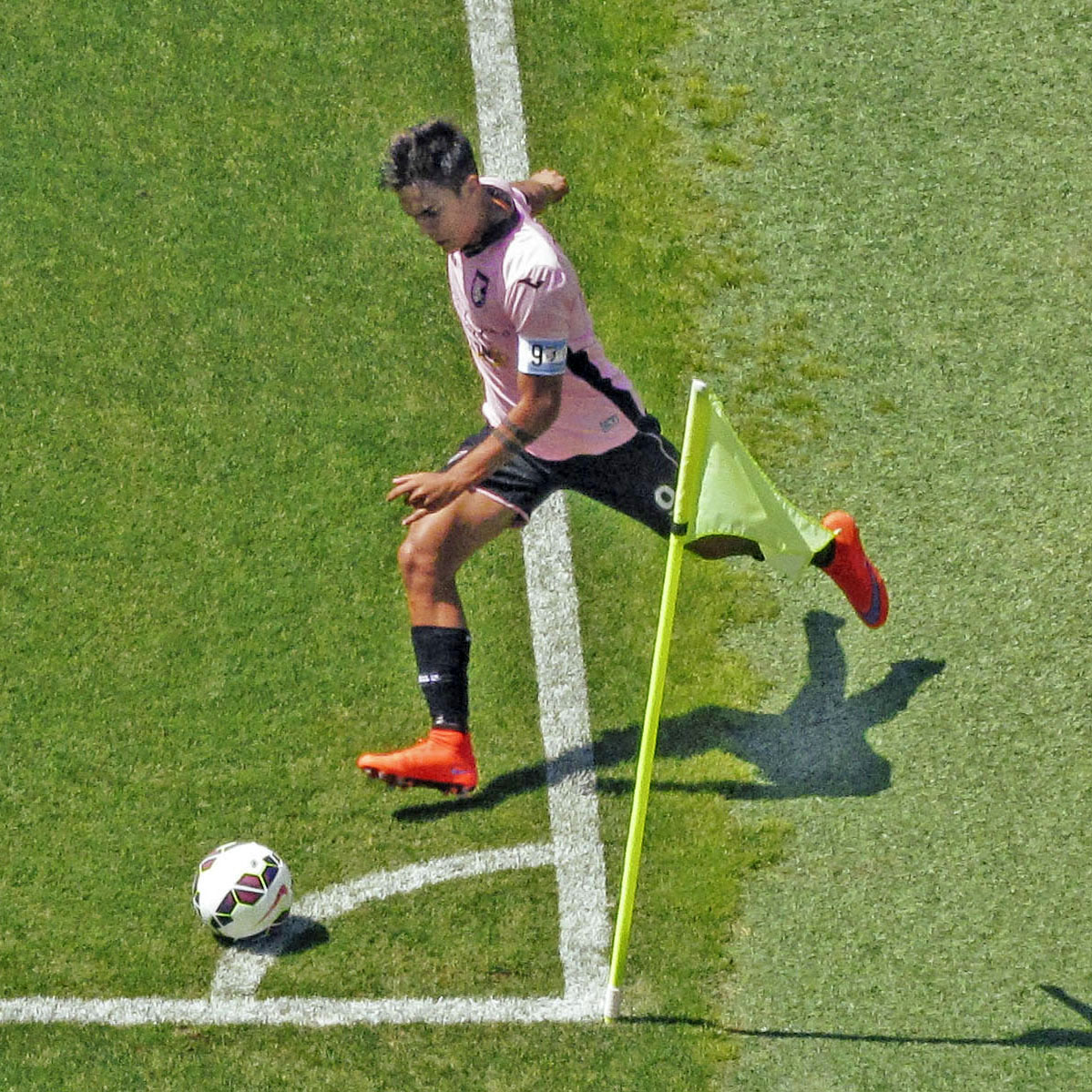 Il calciatore argentino Paulo Dybala all'US Città di Palermo, mentre batte un calcio d'angolo, nel 2015.